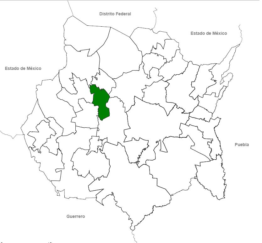 Localización de Emiliano Zapata en el estado de Morelos.